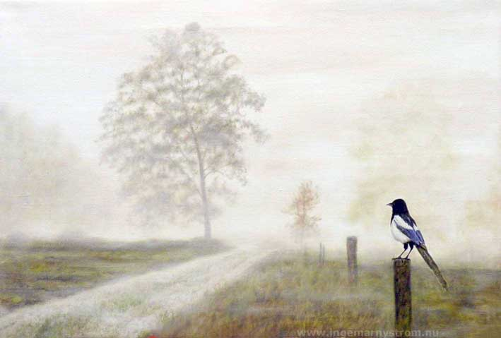 Ett representativt landskap med en fågel.